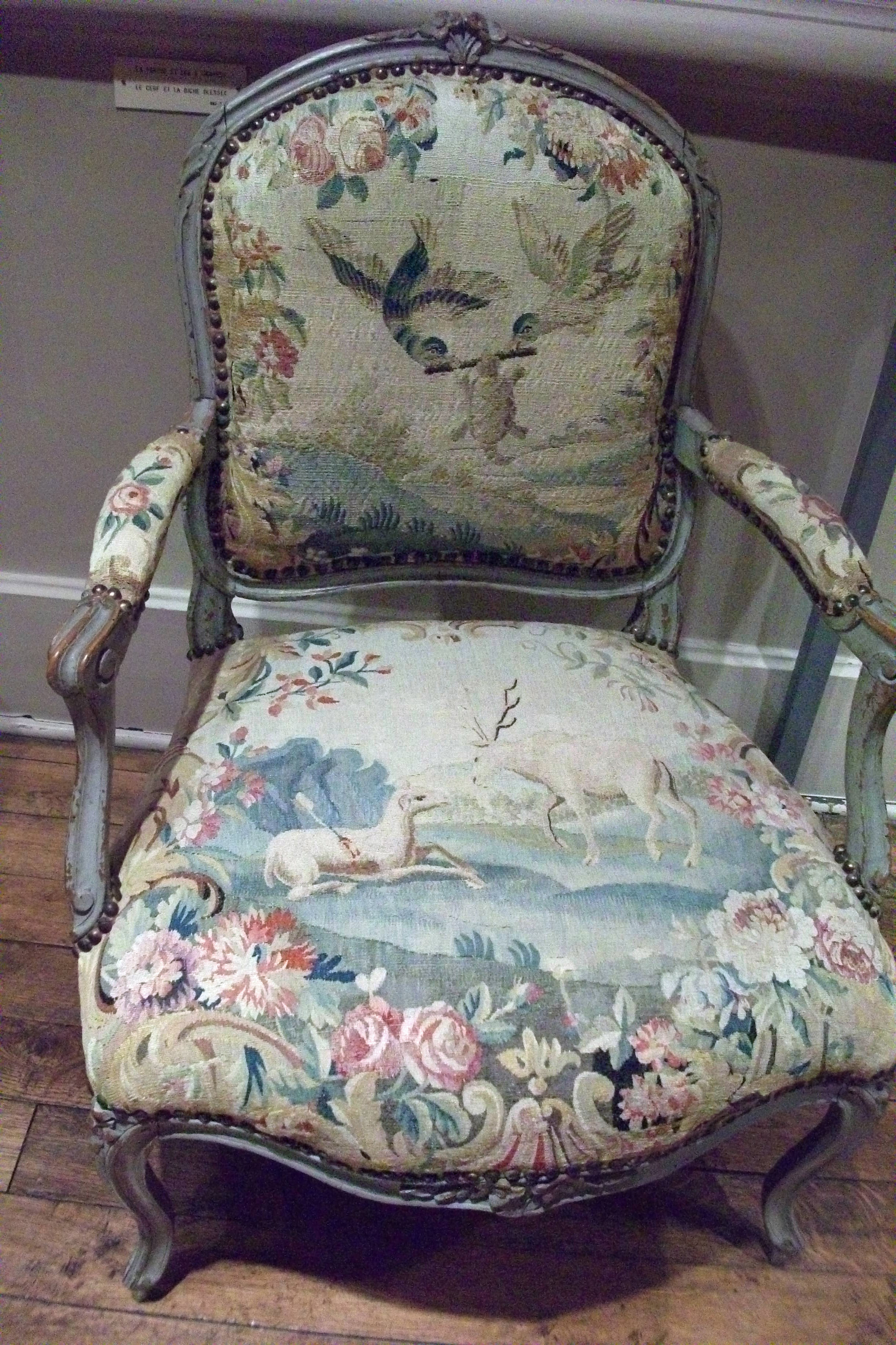 fauteuil provenant d'un lot de huit se situant au château de Sarry exposé au musée de chalons.La torutue et les deux canardds, le cerf et la biche blessée.